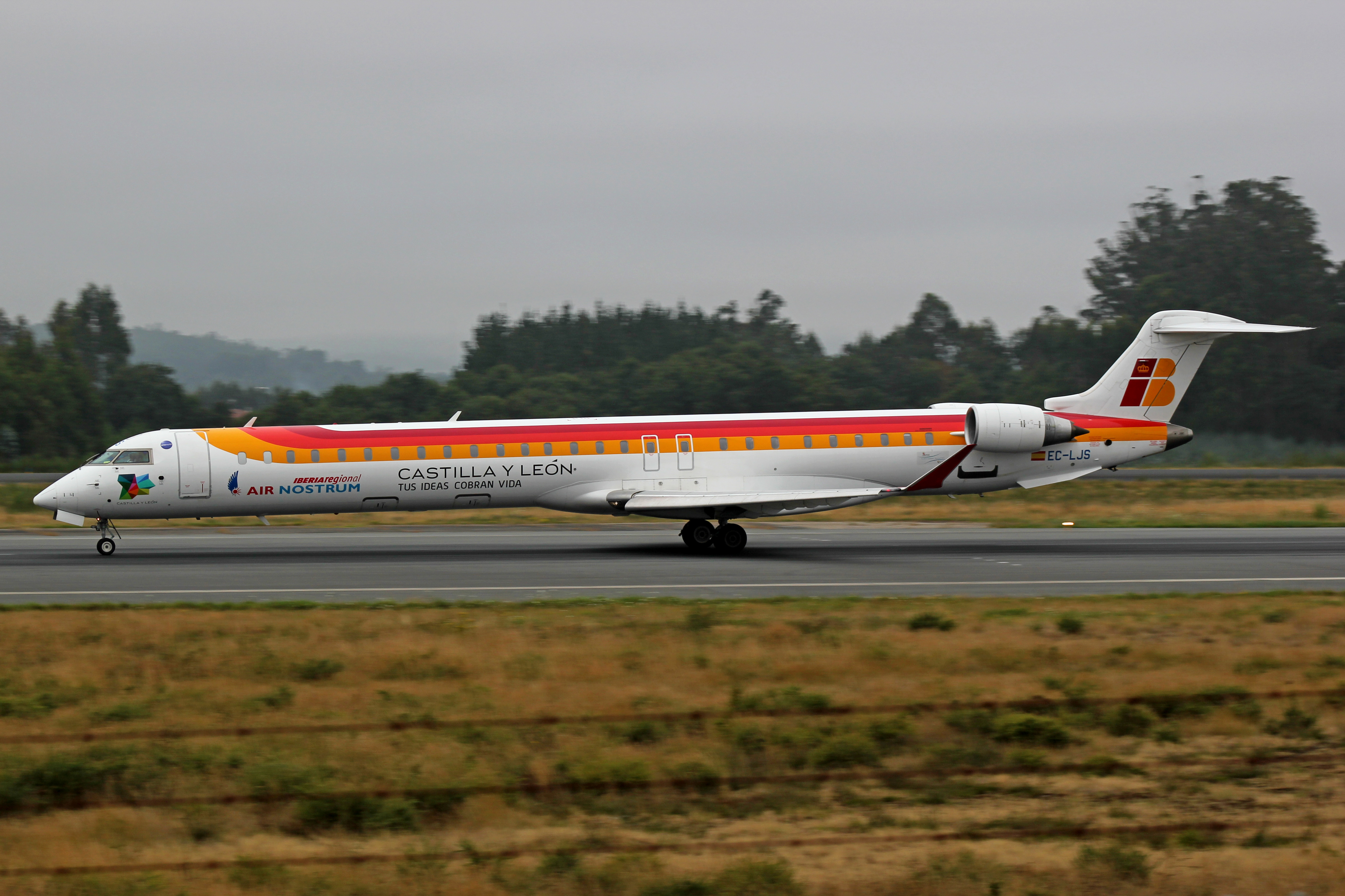 Bombardier CRJ1000 de Air Nostrum aterrando no aeroporto de Santiago de Compostela.